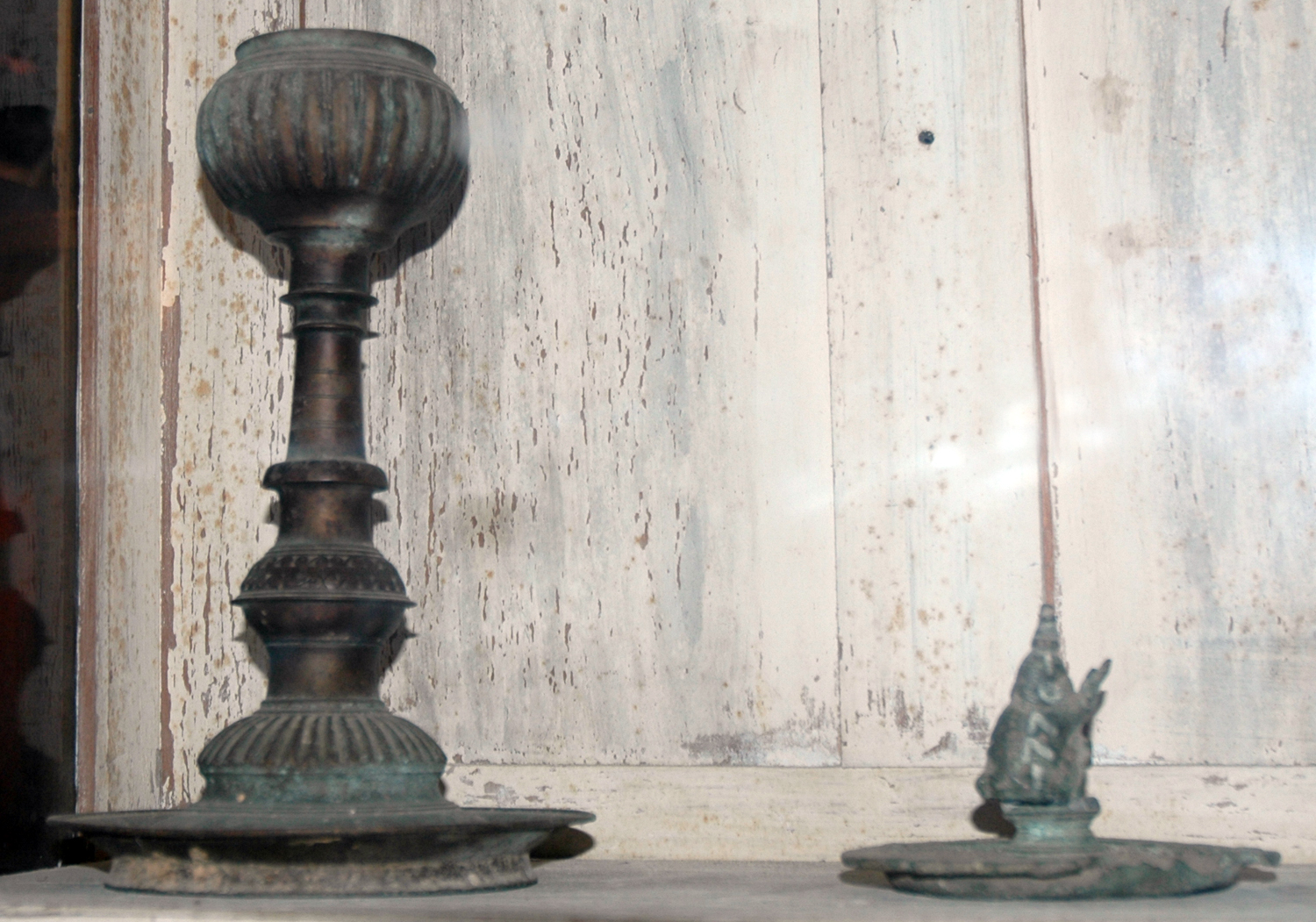 மேசை விளக்குகள் - தொல் பொருட்காட்சிச்சாலை, யாழ்ப்பாணம்